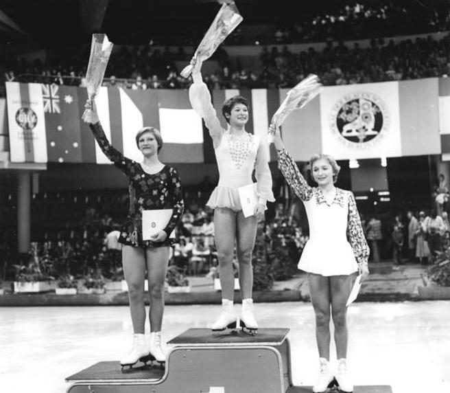 Anett Pötzsch, Marion Weber, Carola Weissenberg ADN-ZB Reiche 20.11.76 Berlin: Eiskunstlauf - Kür der Damen Pokal der Blauen Schwerter. Unter den 16 Bewerberinnen in der Damenkonkurrenz der Internationalen Eiskunstlauf-Wettbewerbe am 20.11.1976 in der Berliner Werner-Seelenbinder-Halle belegte die DDR die ersten drei Plätze. Siegerin wurde die Vize-Europameisterin Anett Pötzsch /7-147,74-Mitte), vor Marion Weber (14-141,88-links) und der erst 13jährigen Carola Weissenberg (24-134,28-rechts). Abgebildete Personen: Weber, Marion: Eiskunstläuferin, SC Karl-Marx-Stadt, DDR Pötzsch, Anett: Eiskunstläuferin, DDR